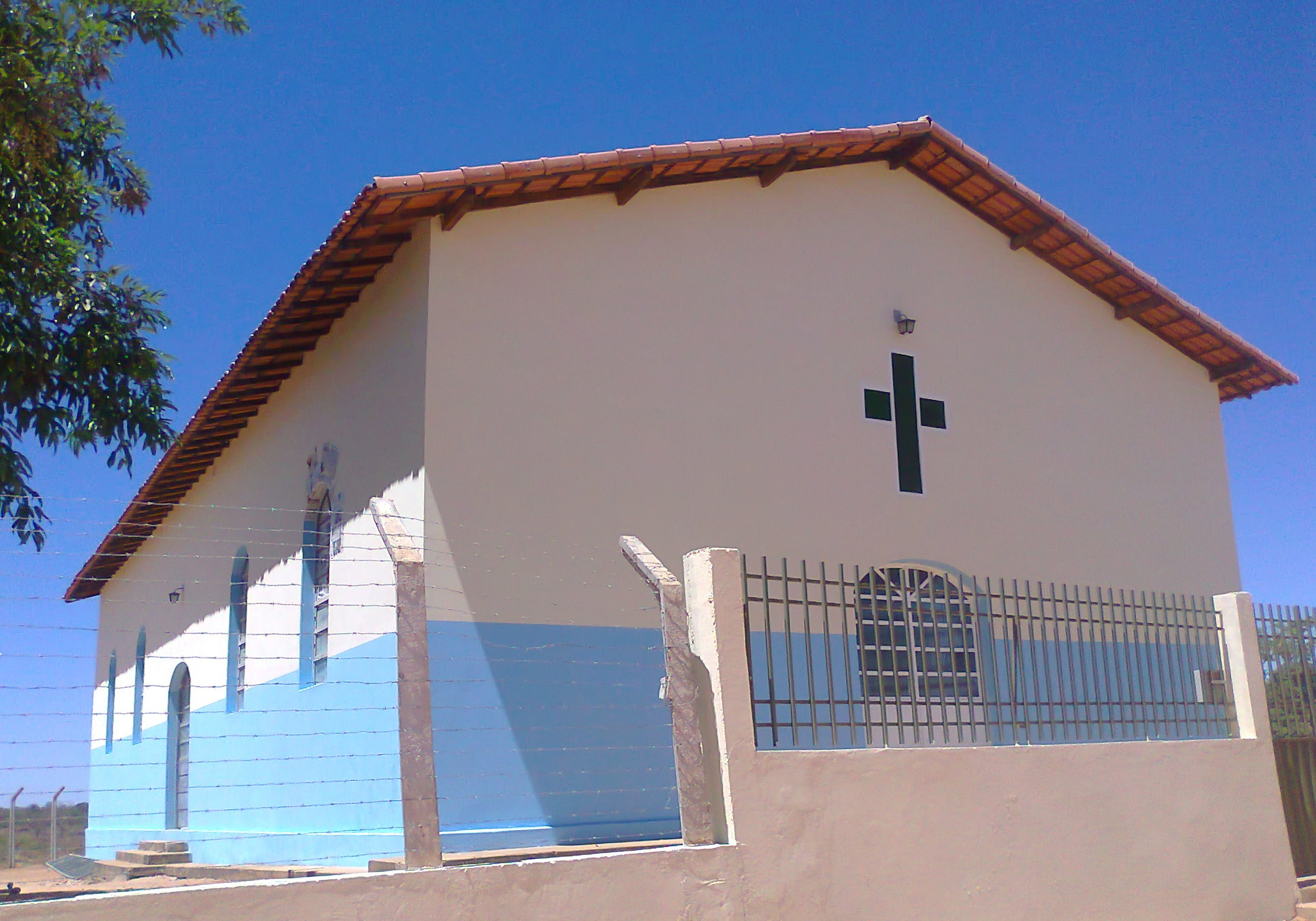 o padroeiro da igrejinha é São Francisco de Assis